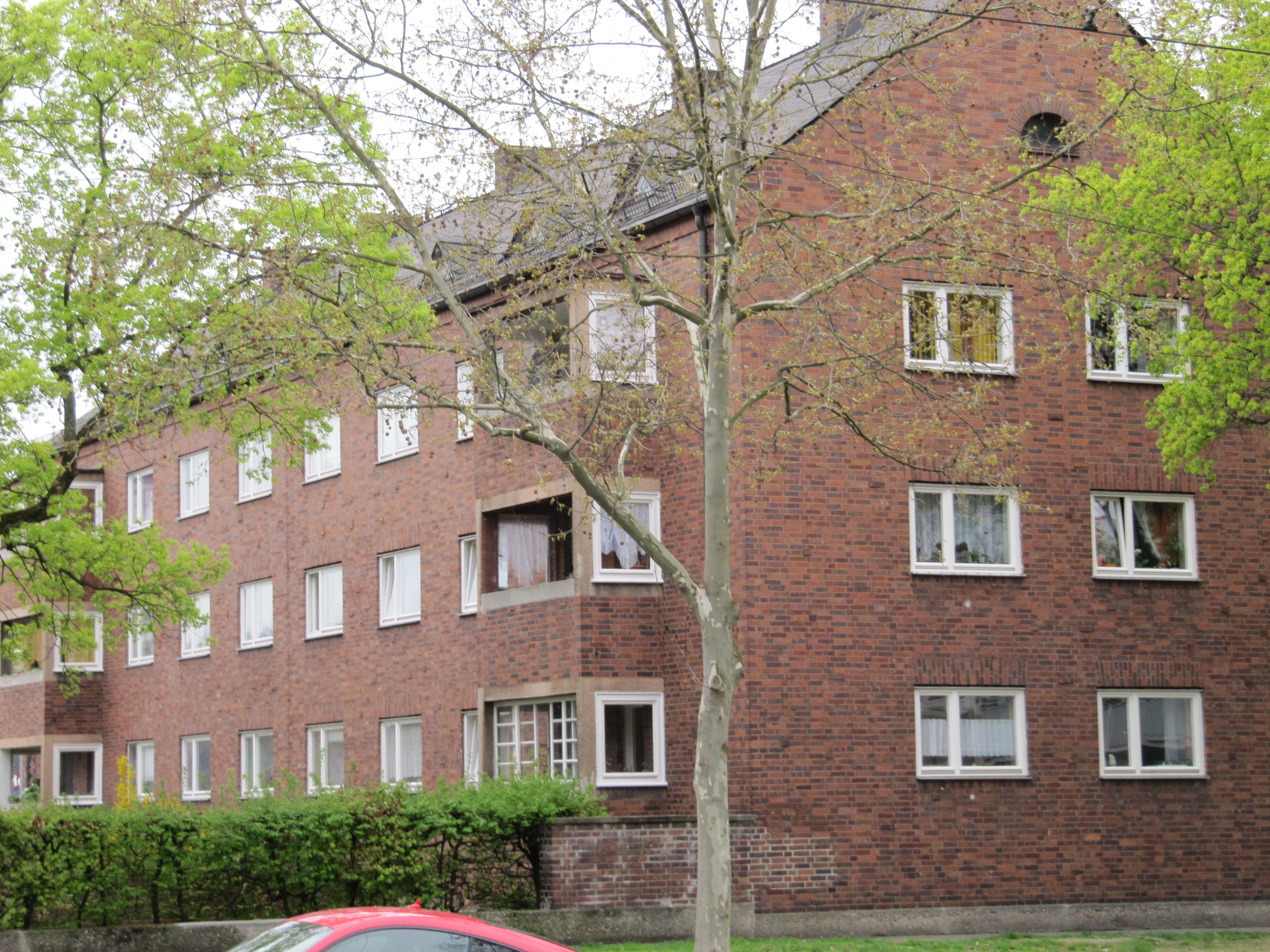 Nürnberger Poststadt ist ein ausgedehntes Betriebsgelände der ehemaligen Reichspost mit Betriebswohnungen